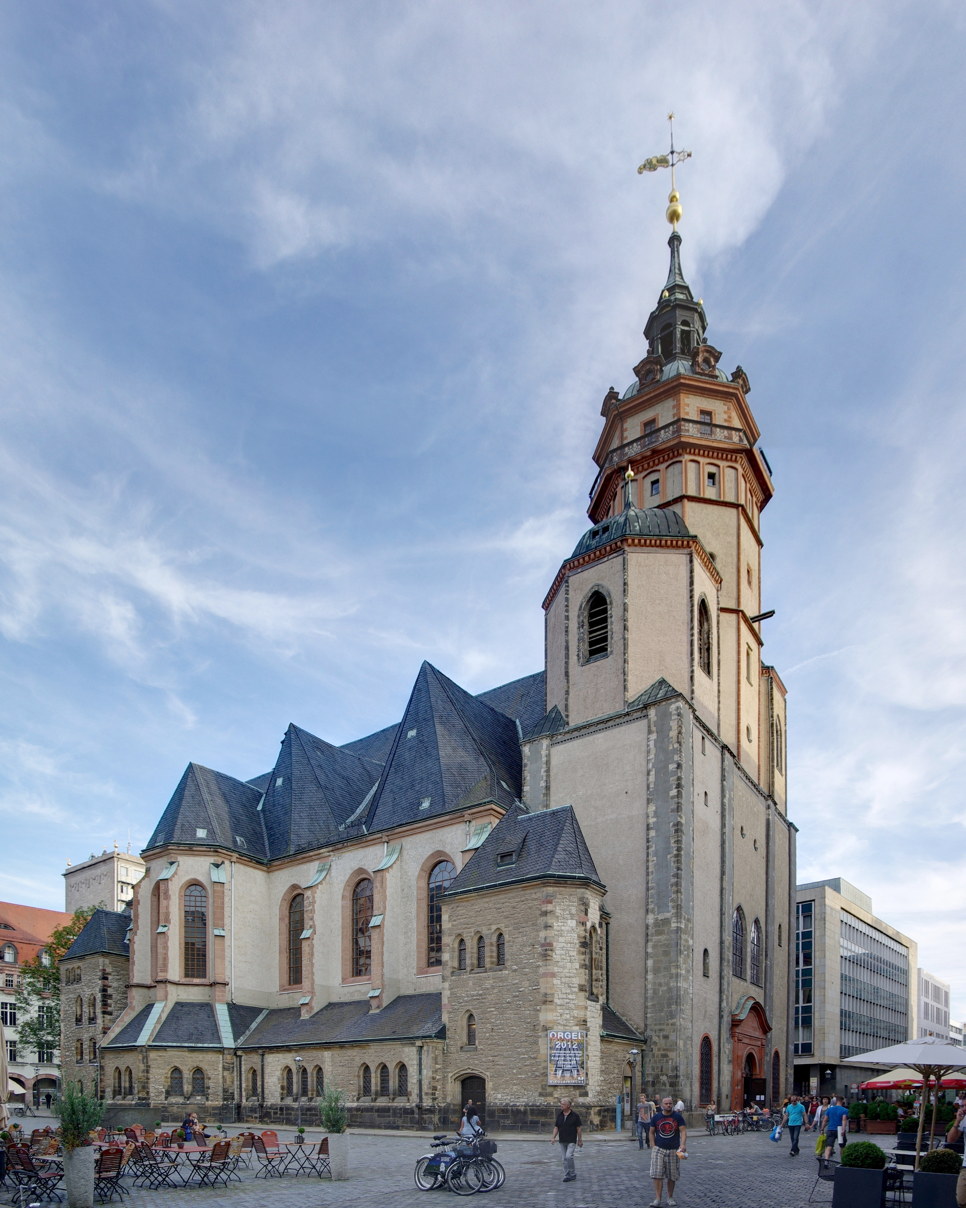 Leipzig, Nilolaikirche